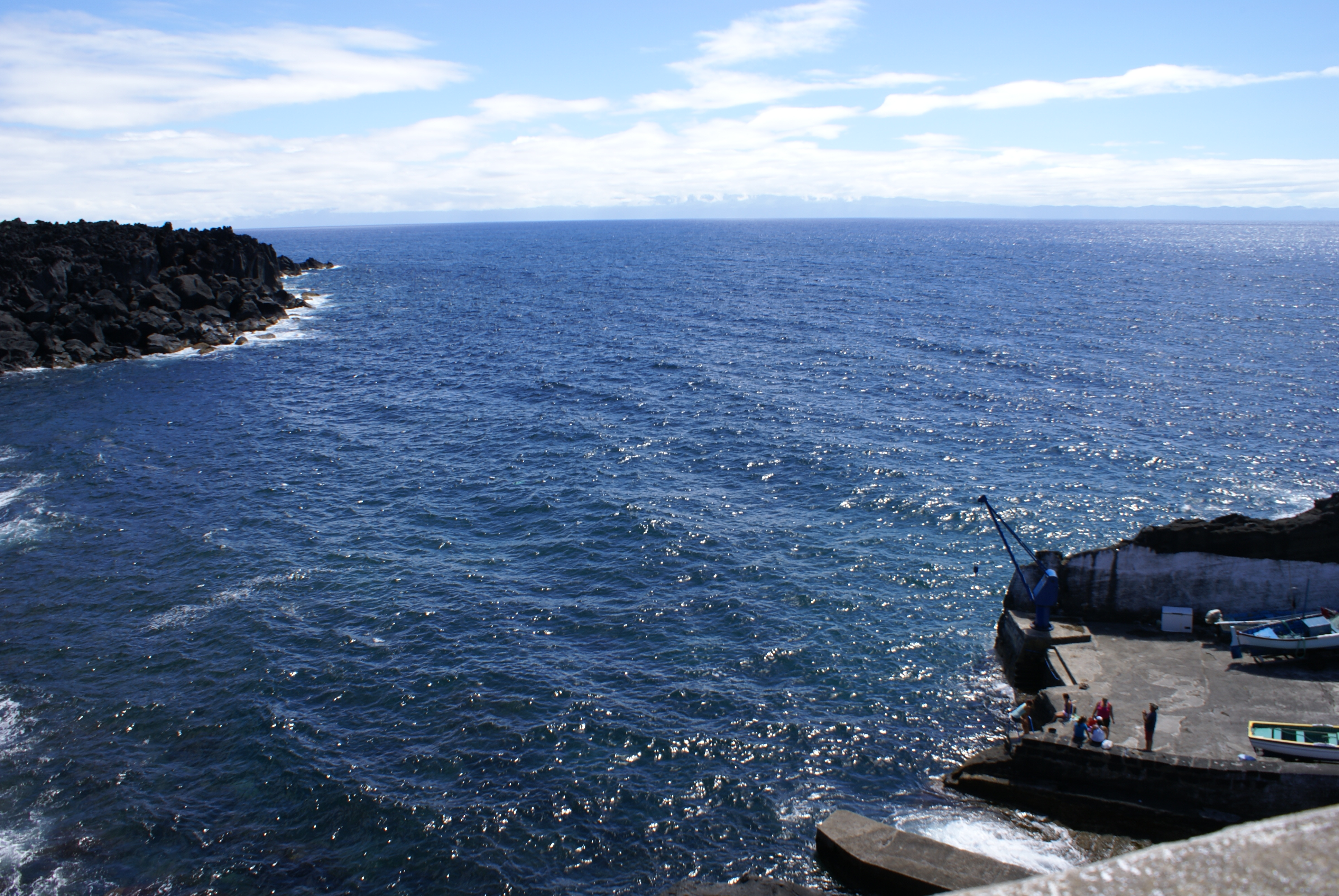 Baía da Folga, vista parcial do porto, Santa Cruz da Graciosa, ilha Graciosa, Açores, Portugal